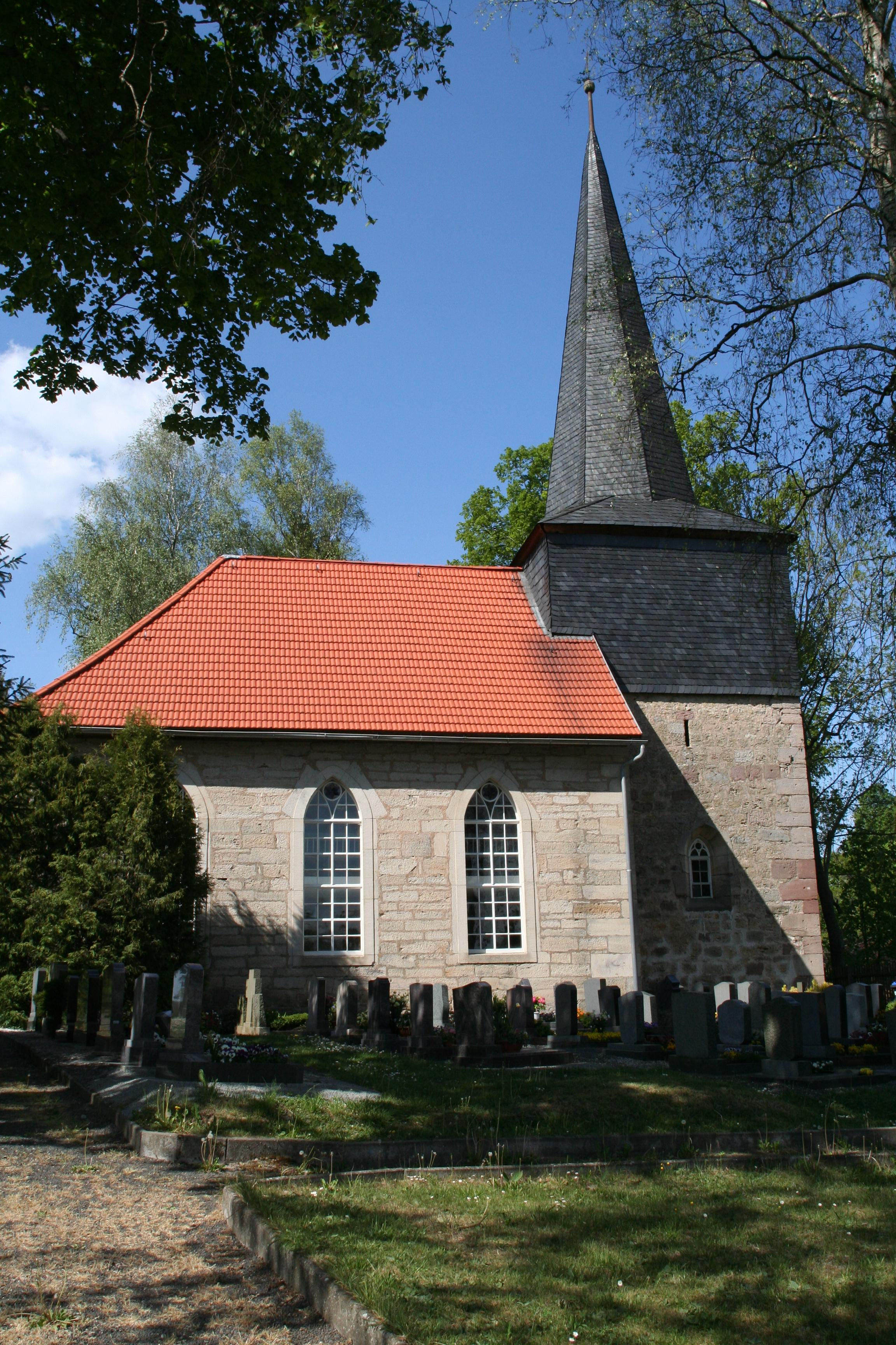 ev. St. Veitskirche Veilsdorf evangelische St. Veitskirche in Veilsdorf, Landkreis Hildburghausen